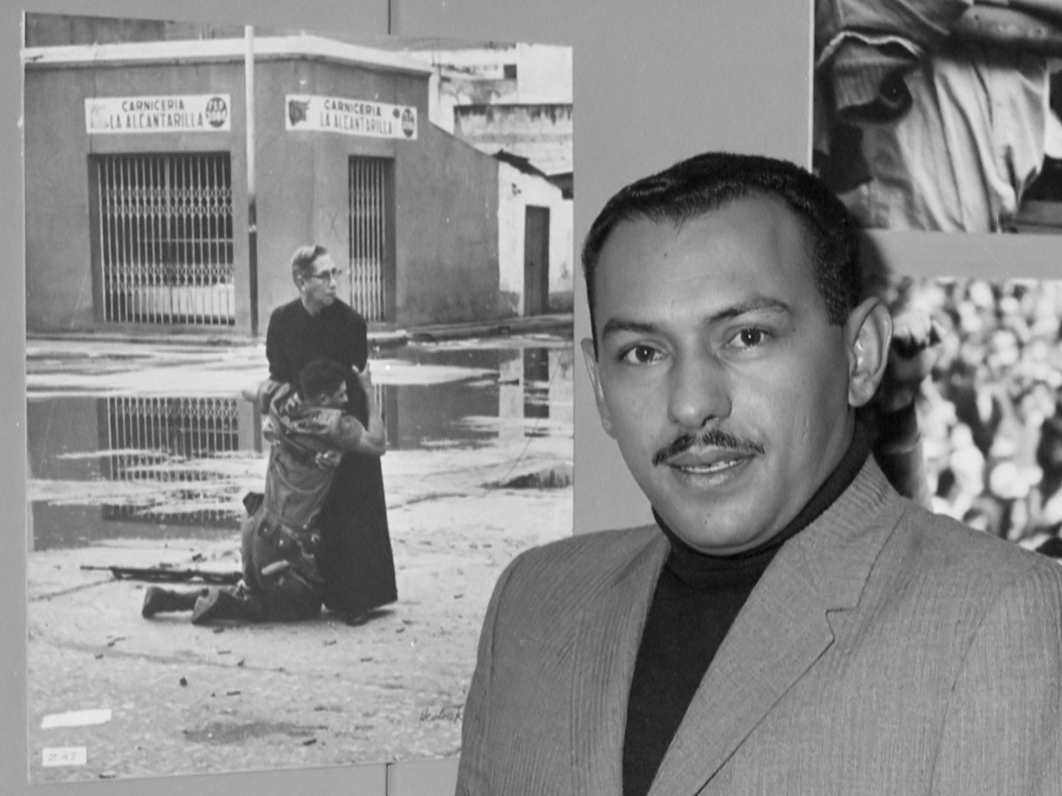 World Press Photo 1962, de winnaar Héctor Rondón Lovera 27 november 1962